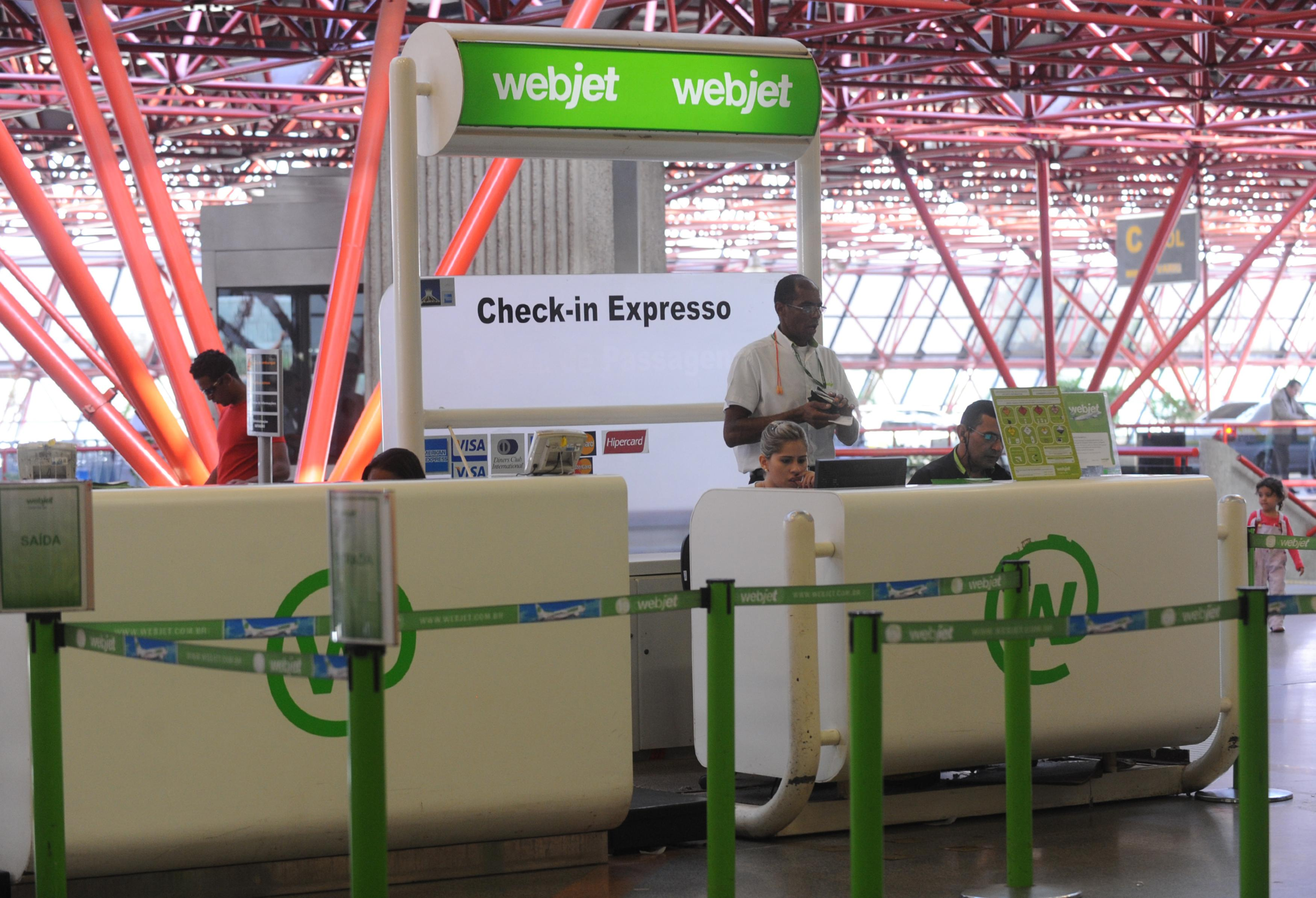 Brasília - A Anac proibiu a companhia aérea Webjet de vender passagens até amanhã (1º) por causa dos cancelamentos de voos (Antonio Cruz/ABr)